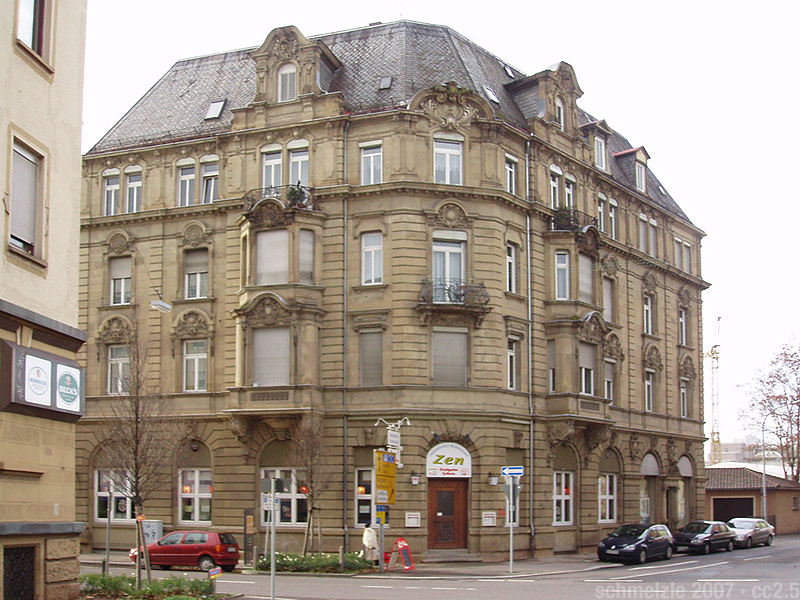 Hotel Hubmann in Heilbronn. Das Gebäude steht unter Denkmalschutz. Der Bau wurde 1898 in der Wilhelmstraße 58 nach Plänen von August Dederer als Hotel für den Schreinermeister Friedrich Hubmann erbaut.